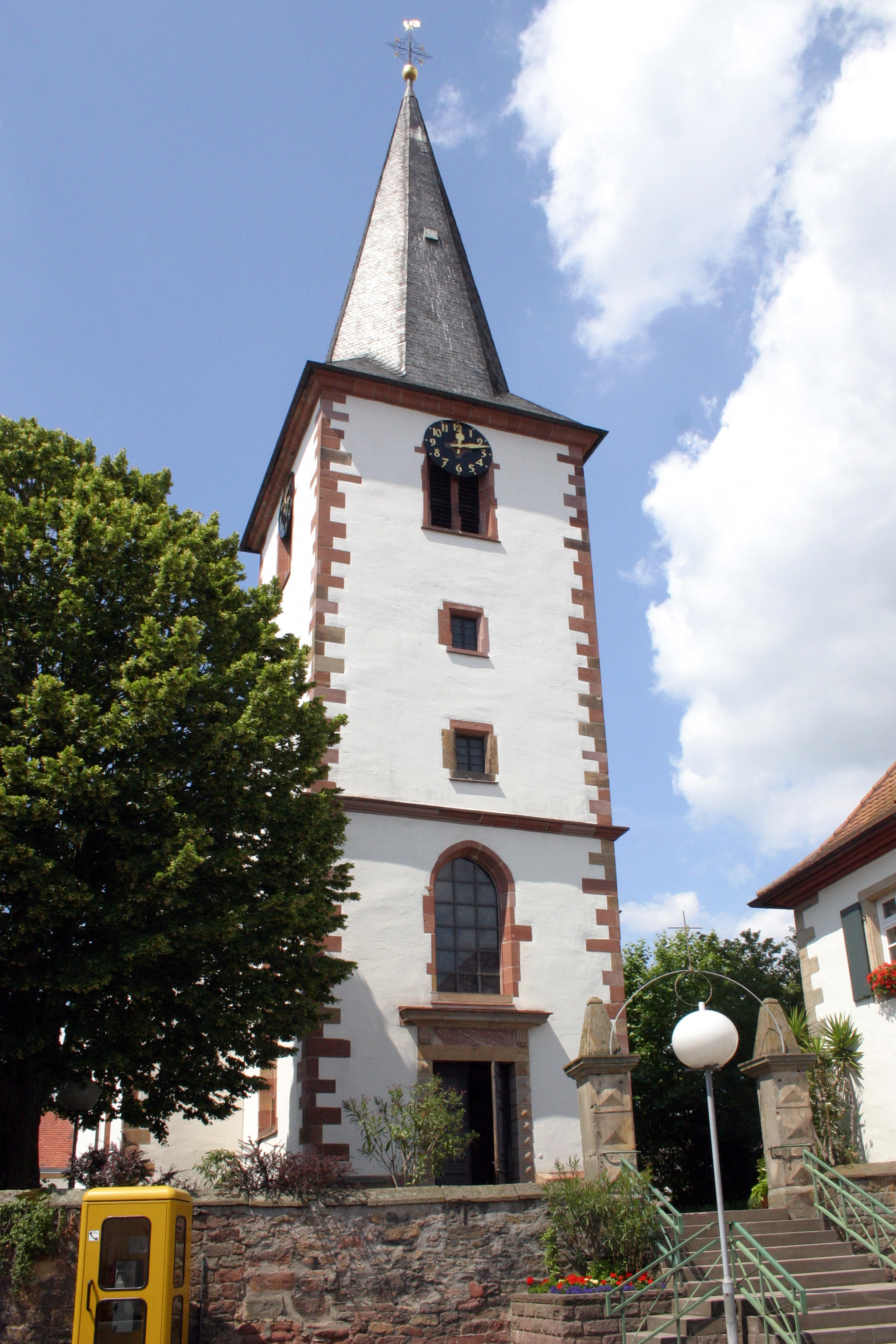 Ottersheim, Germersheimer Straße 3; Katholische Pfarrkirche St. Martin; fünfachsiger Saalbau, 1618, 1789 erweitert, gotischer ehemaliger Chorturm; Sandsteinkruzifix über Adam und Eva, bezeichnet 1747.